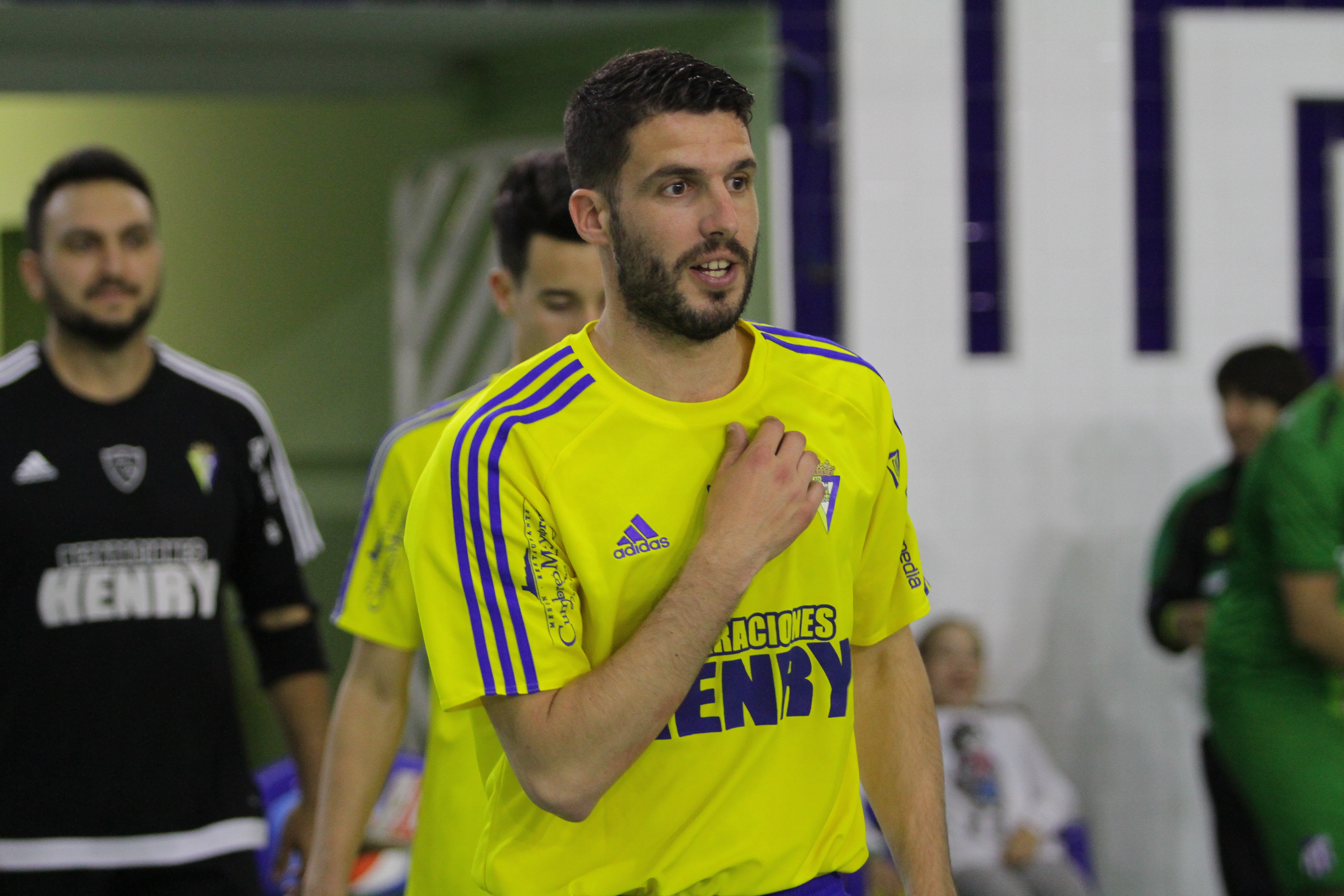 Álex González, jugador del Cádiz CF Virgili